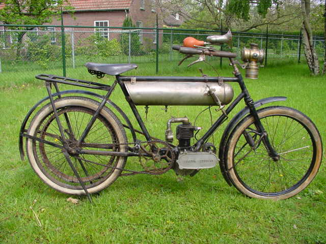 Toestemming van Yesterdays Antique Motorcycles (